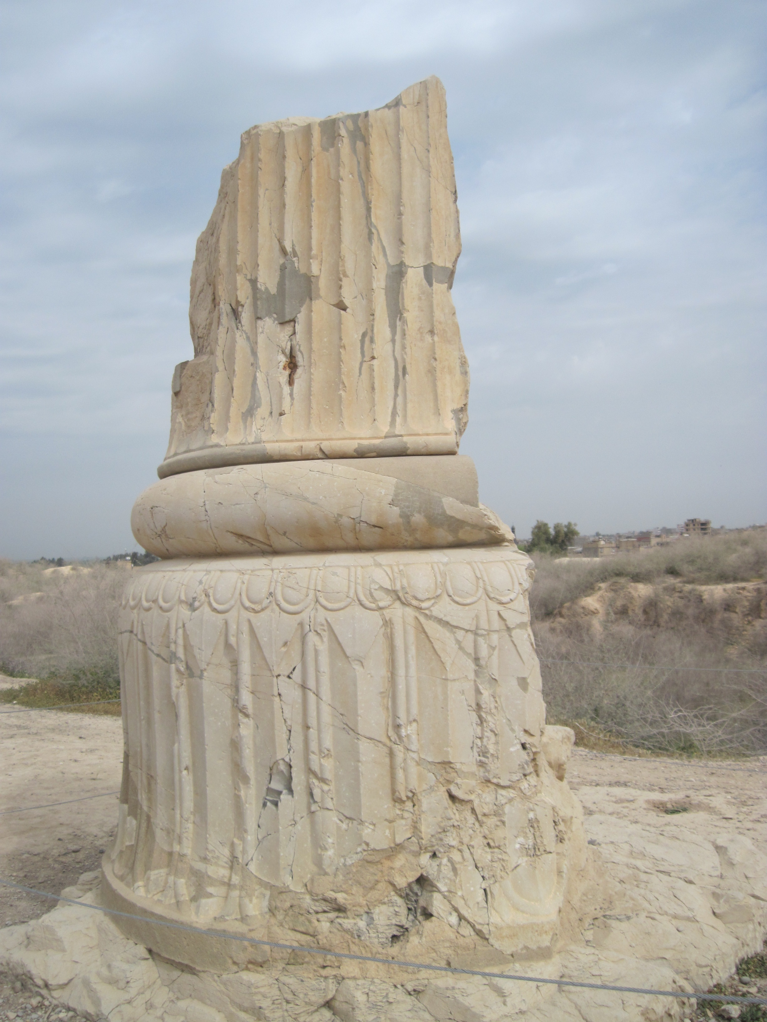 از این کاخ تنها خرده‌های چند ستون و سرستون باقی مانده. این کاخ به دستور داریوش بزرگ و قبل از ارگ پارسه (تخت جمشید) ساخته شده بود.